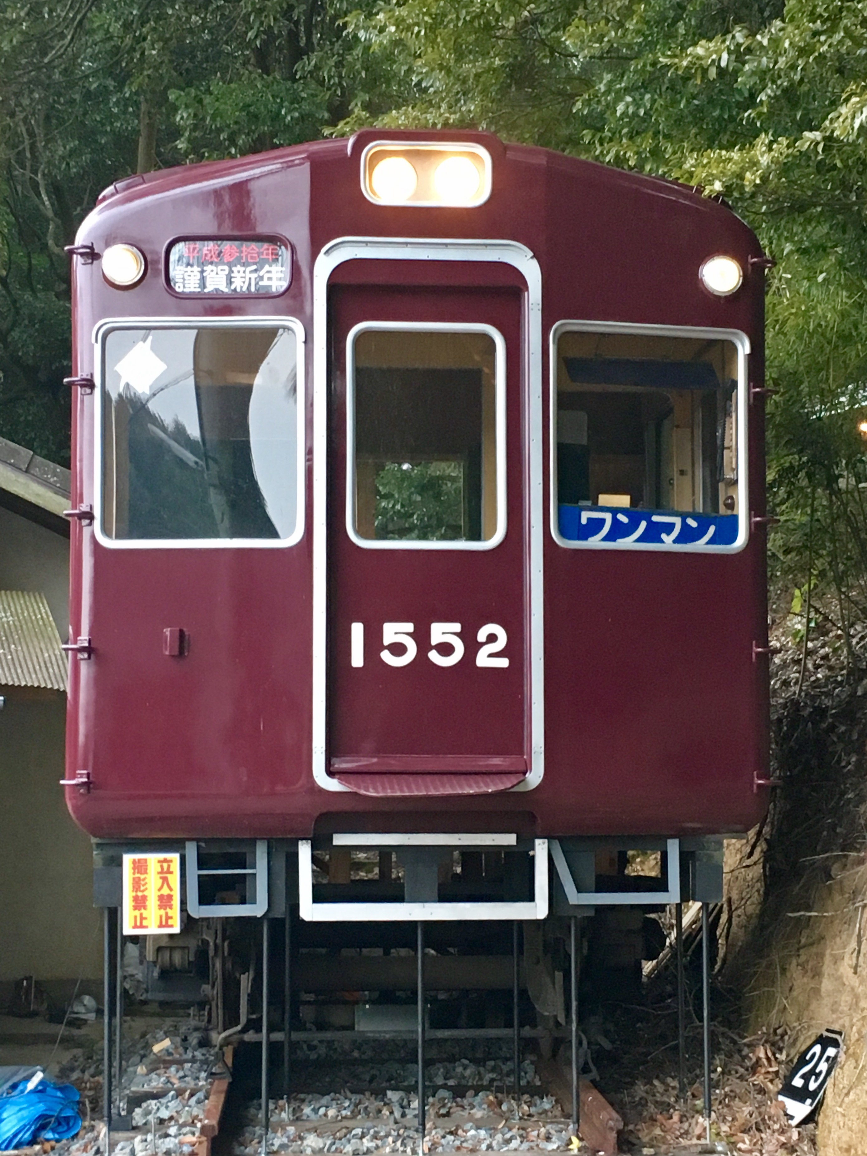 吉川八幡神社 能勢電鉄1552